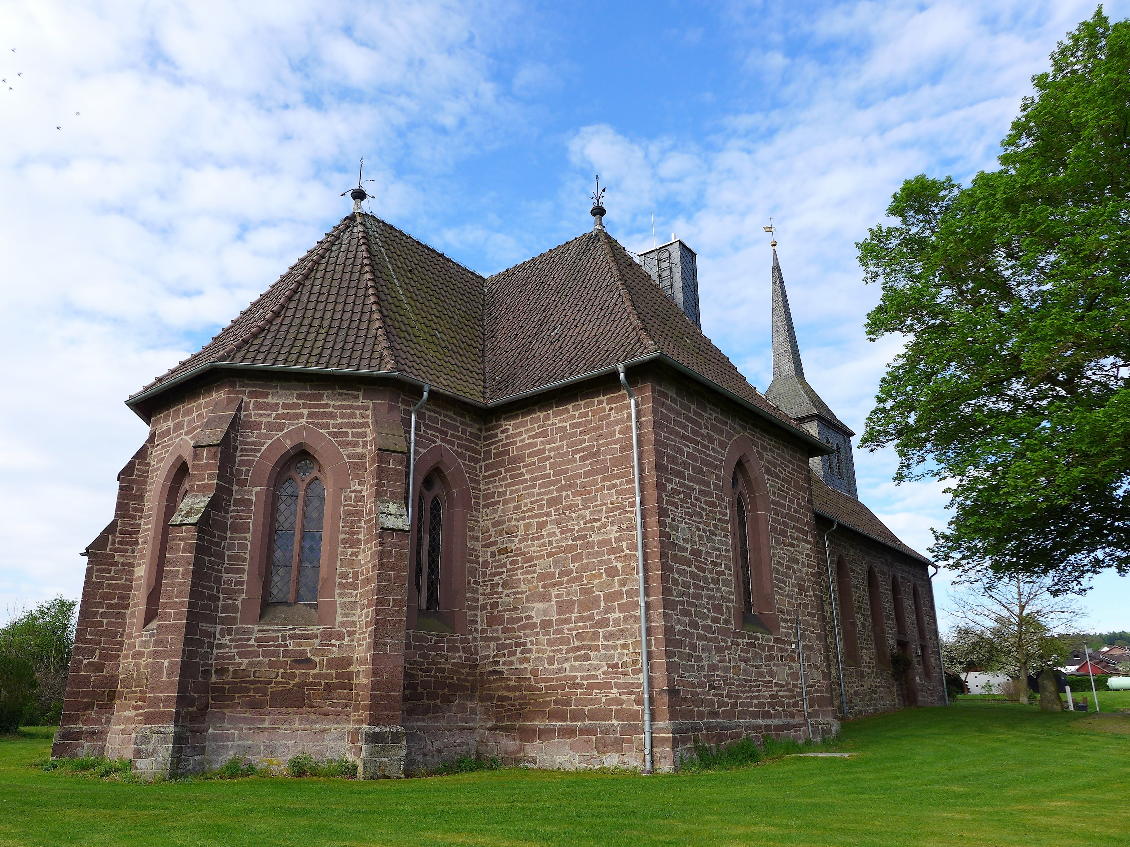 Kirche